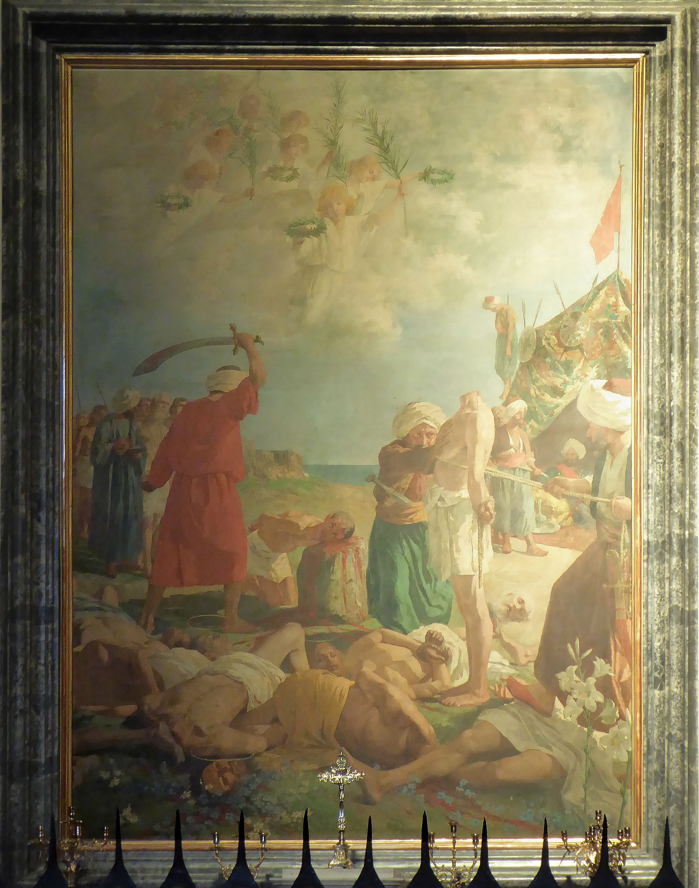 Pintura en la Catedral de Nápoles que grafica la concepción del artista de la matanza de ciudadanos de Otranto por parte de los otomanos en 1480.